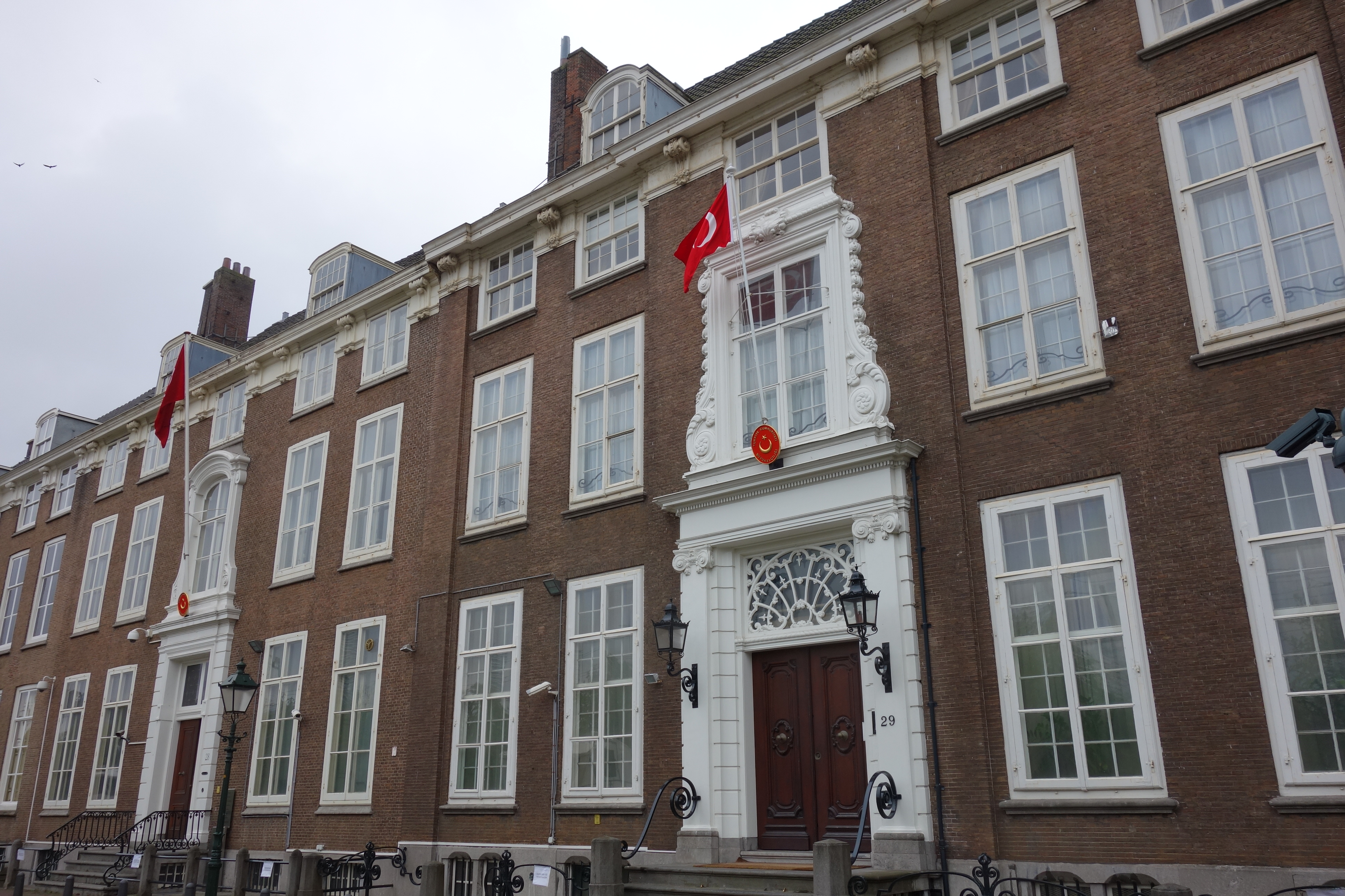 Gehele Turkse ambassade